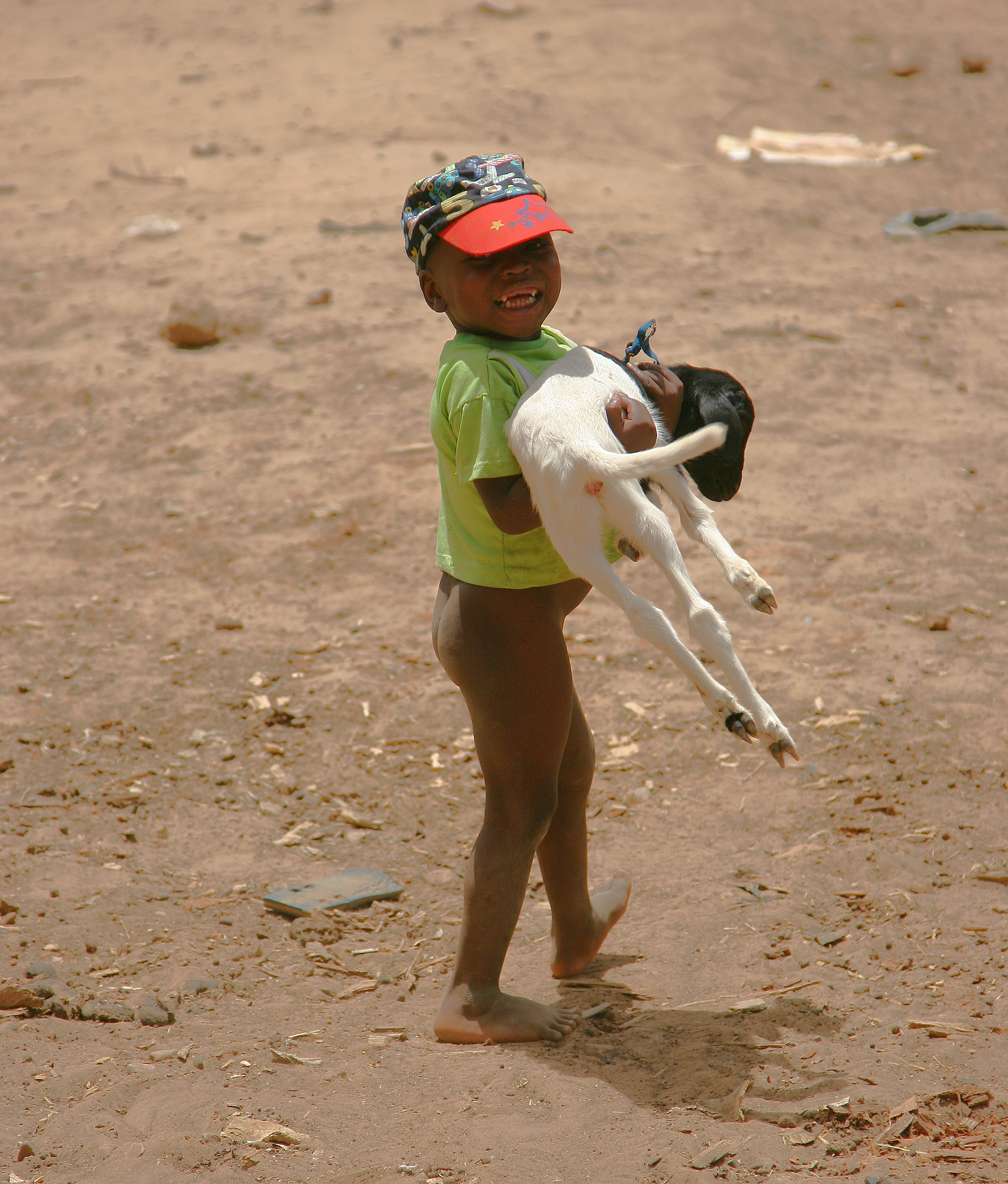 Mali, June 2008